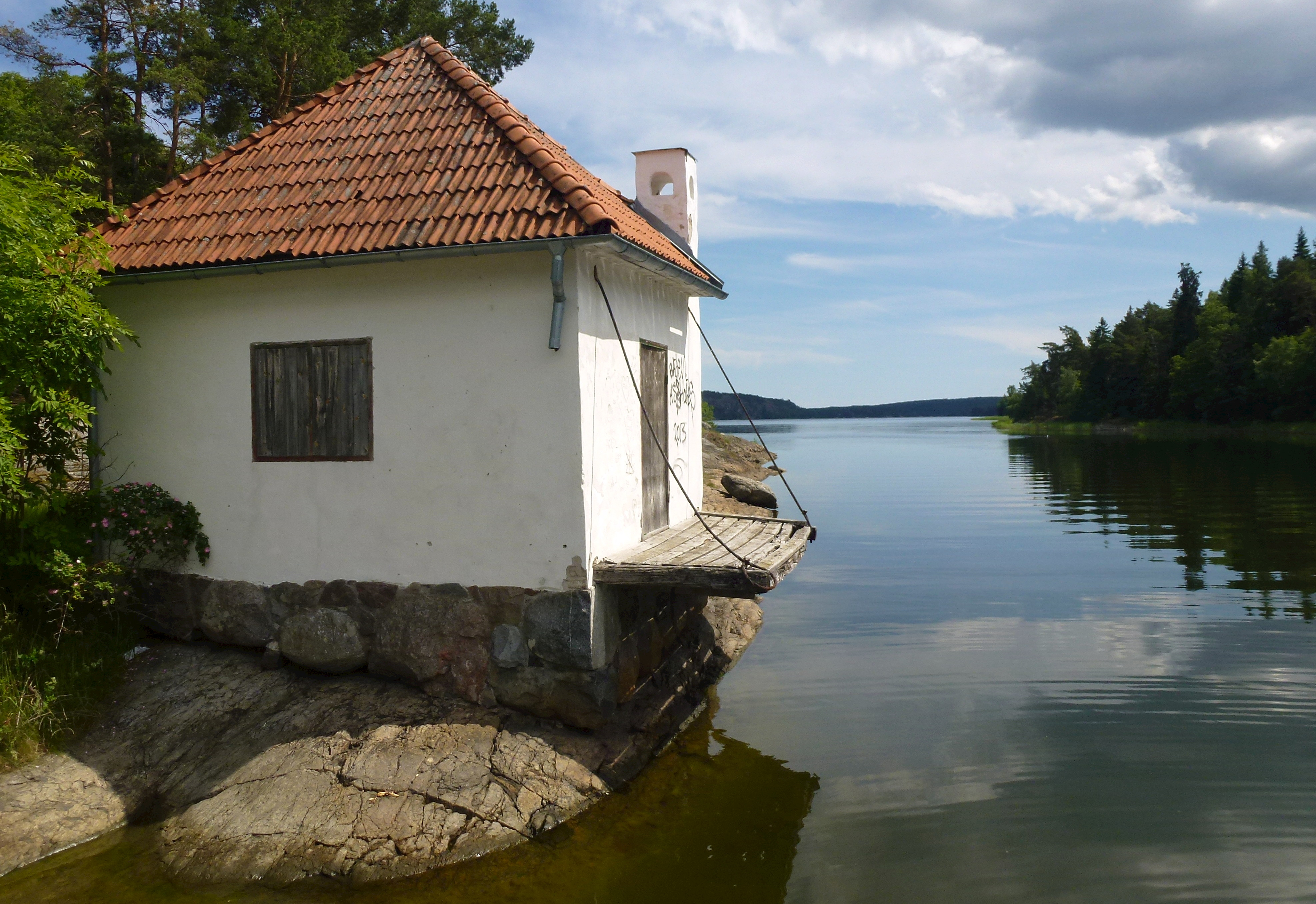 Kalvfjärden vid Notholmen, Tyresö kommun